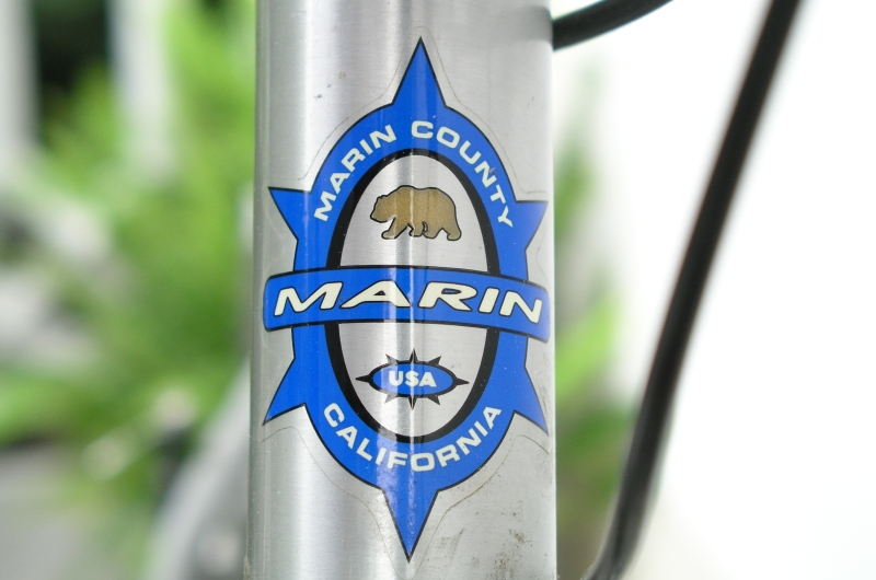 Marin logo